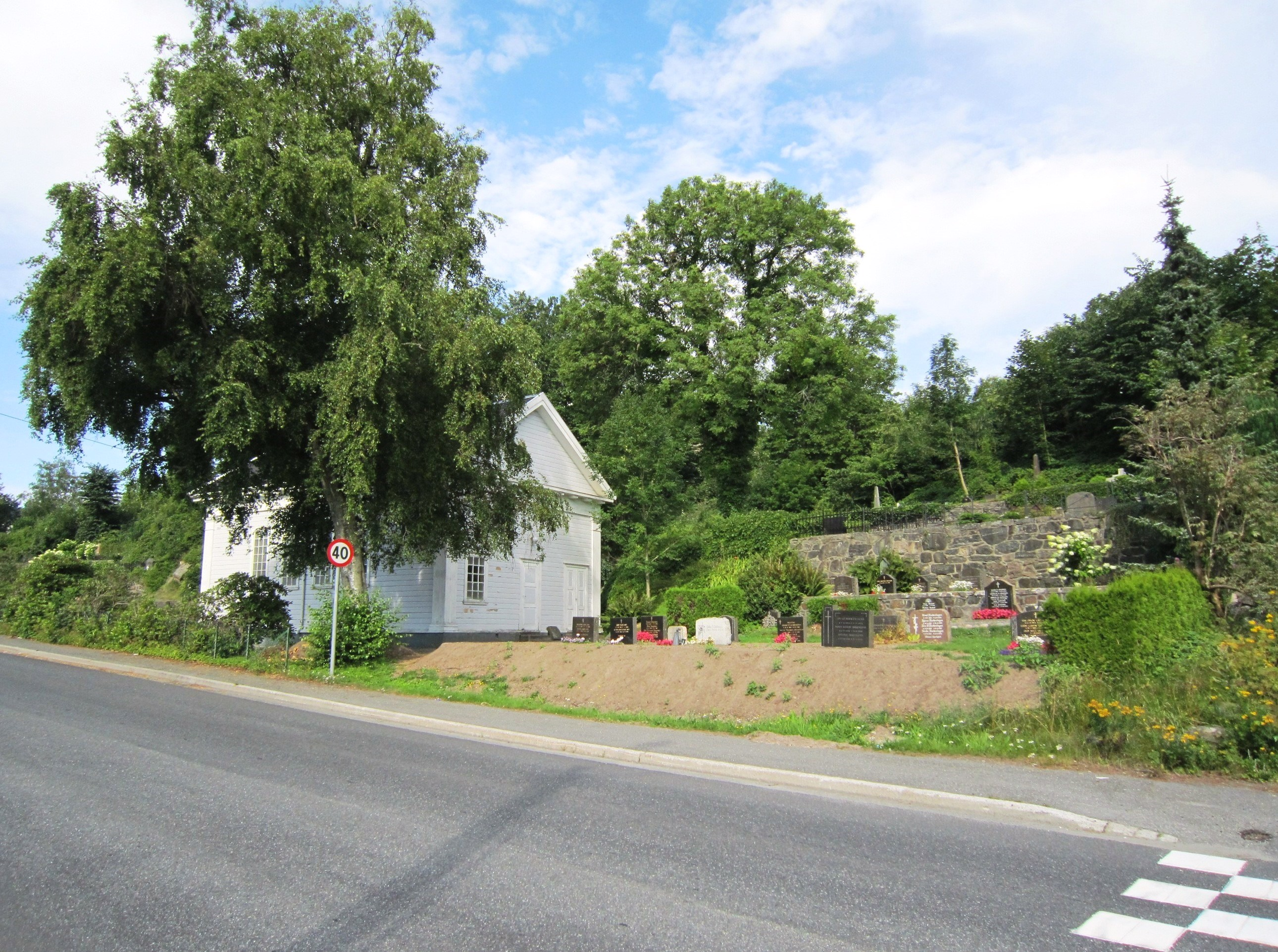 Fylkesvei 22 går forbi Barbu kirkegård.